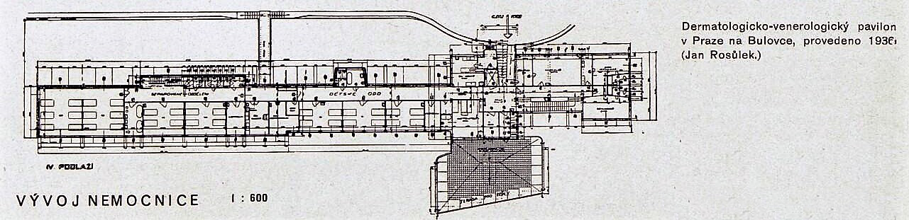 Projekt dermatologicko-venerologického pavilonu, Praha-Bulovka, 1936